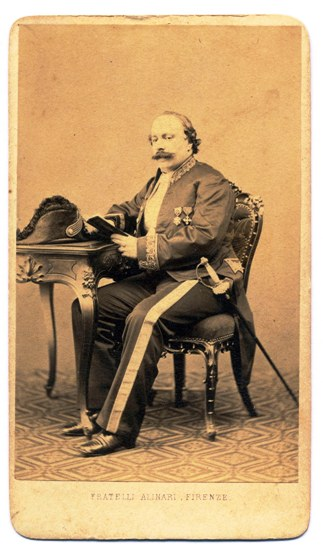 Giovanni Servadio, primo presidente della Banca Italo-Germanica